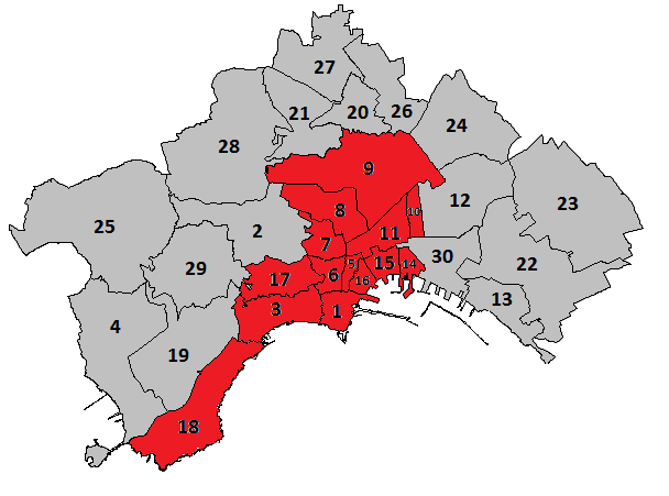 Mappa dei quartieri di Napoli Patrimonio dell'Umanità